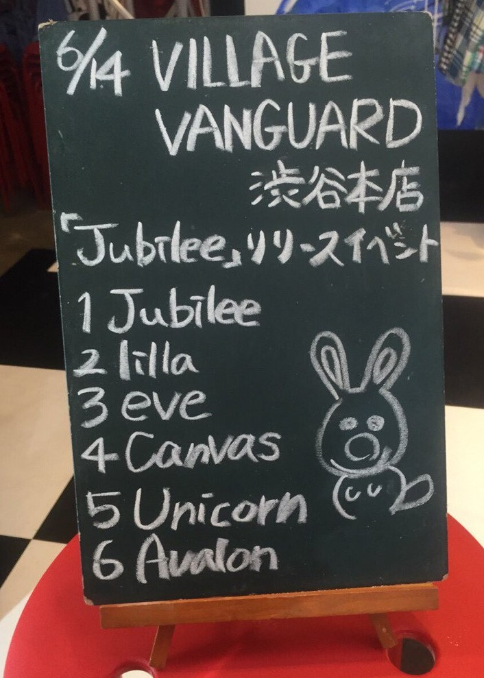 amiinAセトリボード(20180614(1))